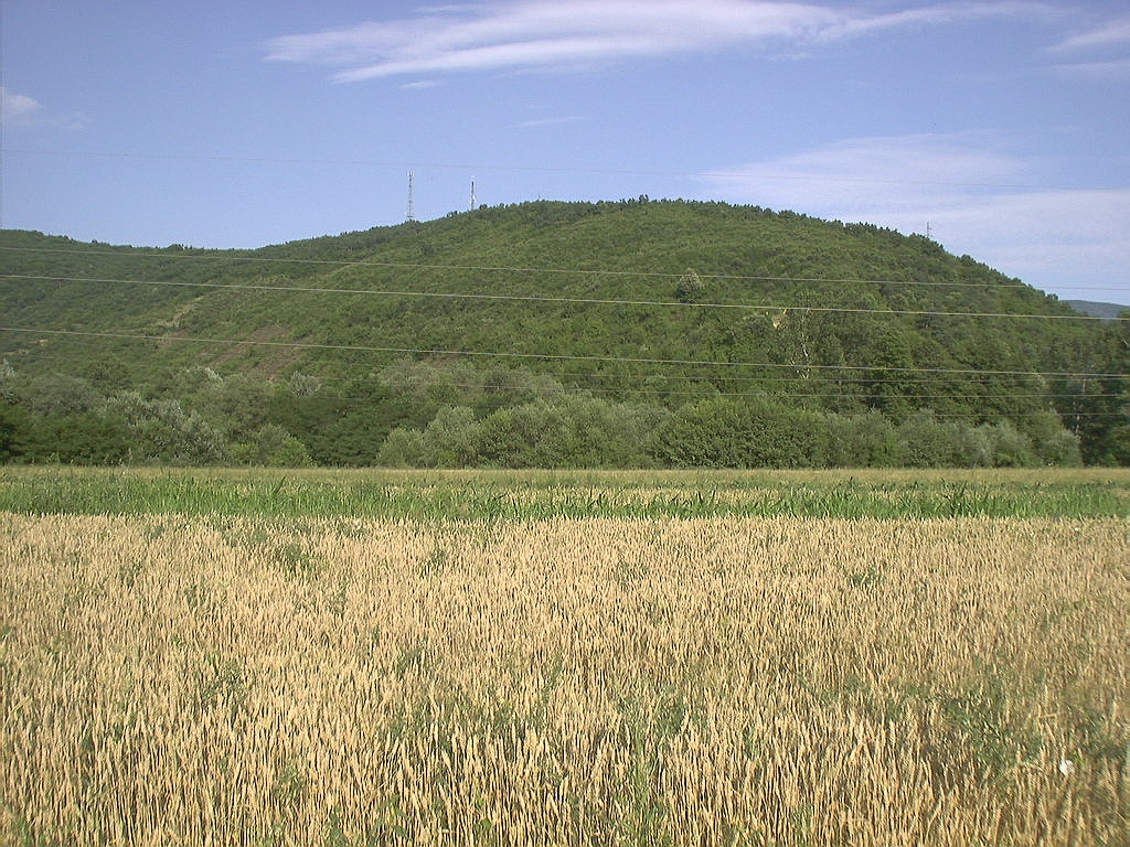 Поглед на Горица од селото Радиовце.